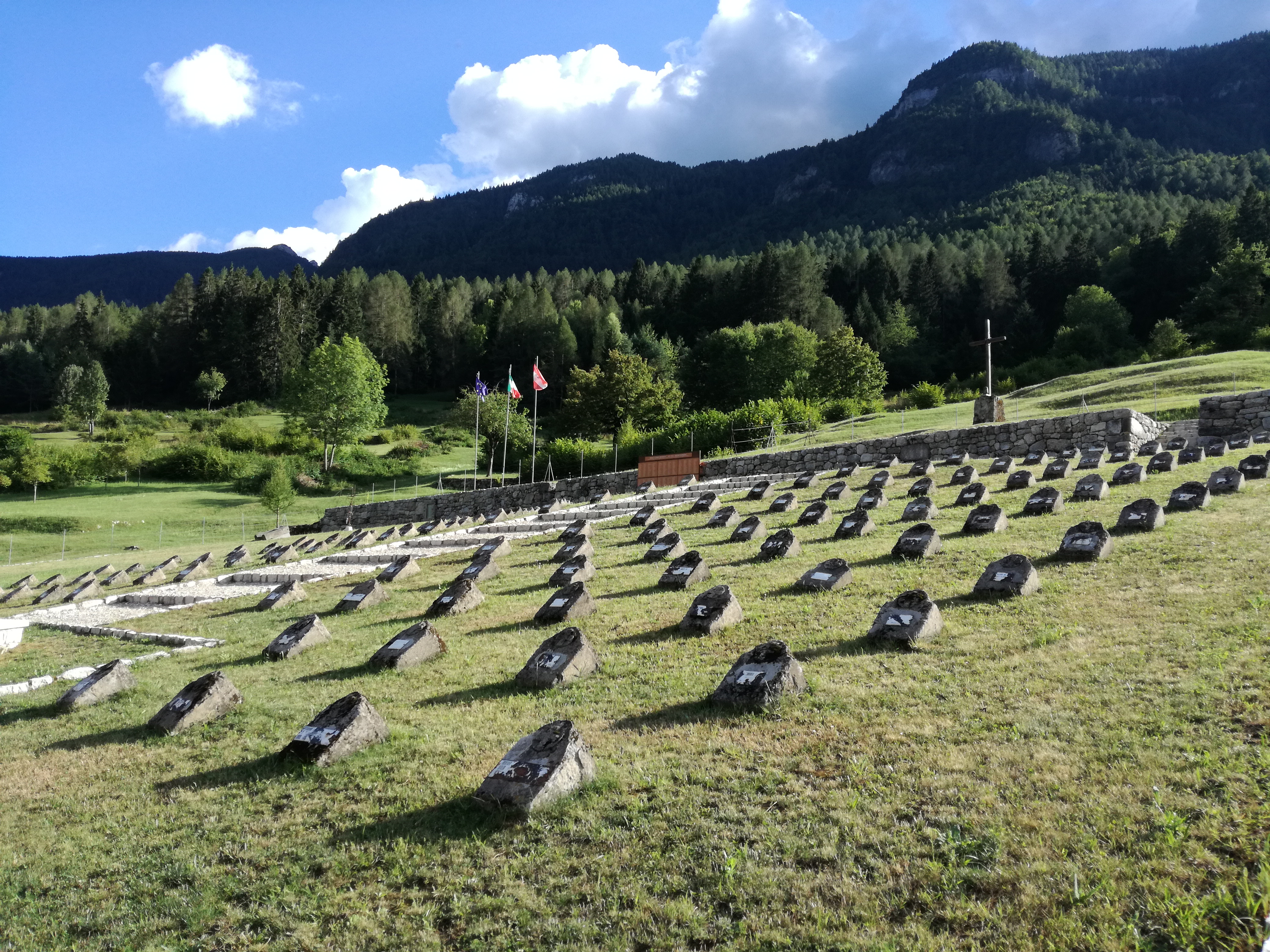 Österreichisch-ungarischer Soldatenfriedhof in Geroli im Val Terragnolo (Trentino)